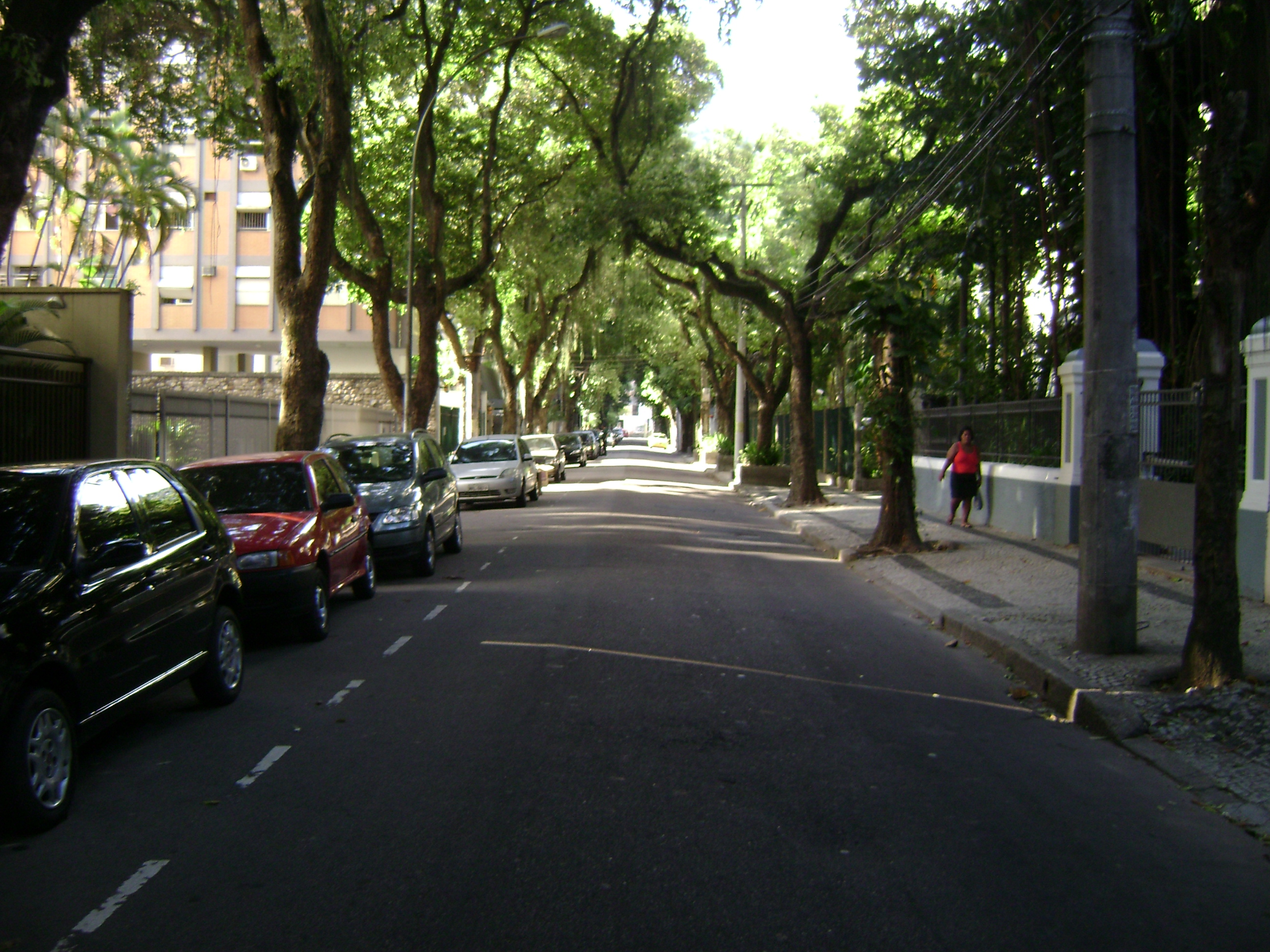 Vista da rua Dona Mariana, no bairro Botafogo da cidade de Rio de Janeiro, Brasil.